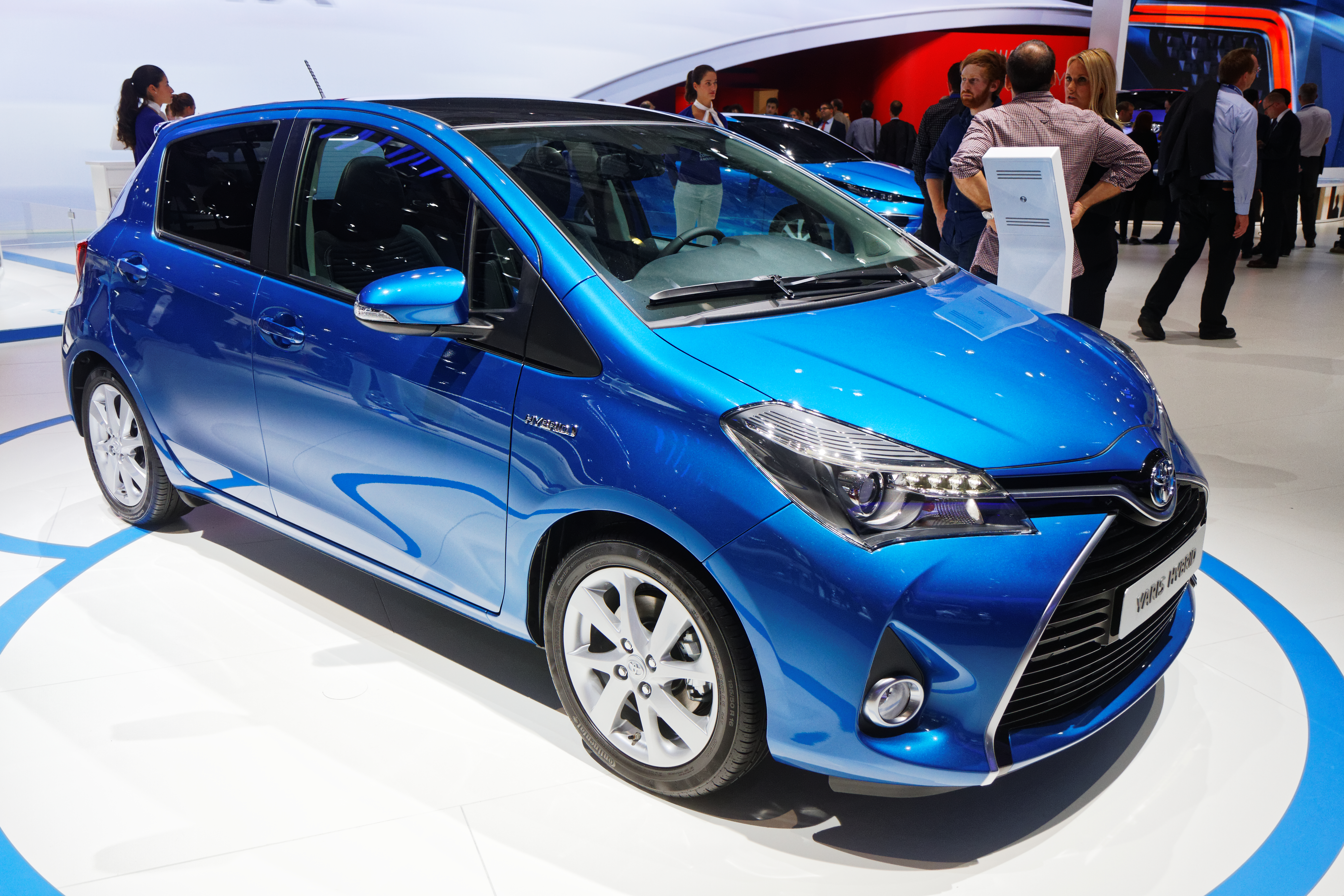 Une Toyota Yaris Hybrid présentée lors du mondial de l'automobile de Paris 2014.